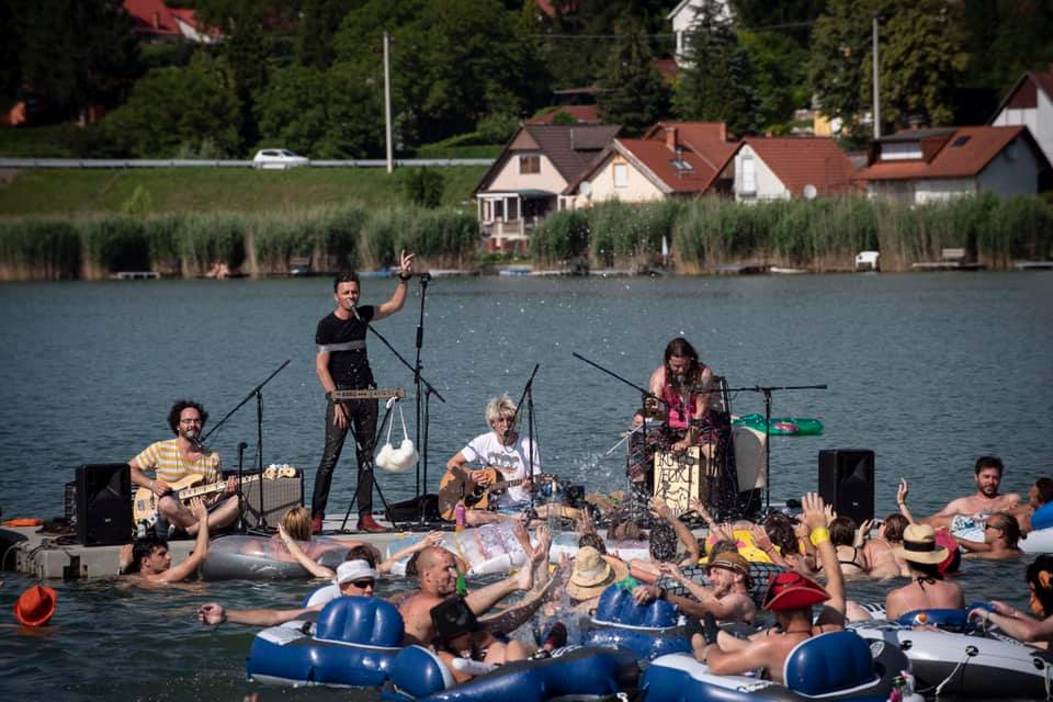 Röhös Foxi koncert a Fishing On Orfű Fesztiválon